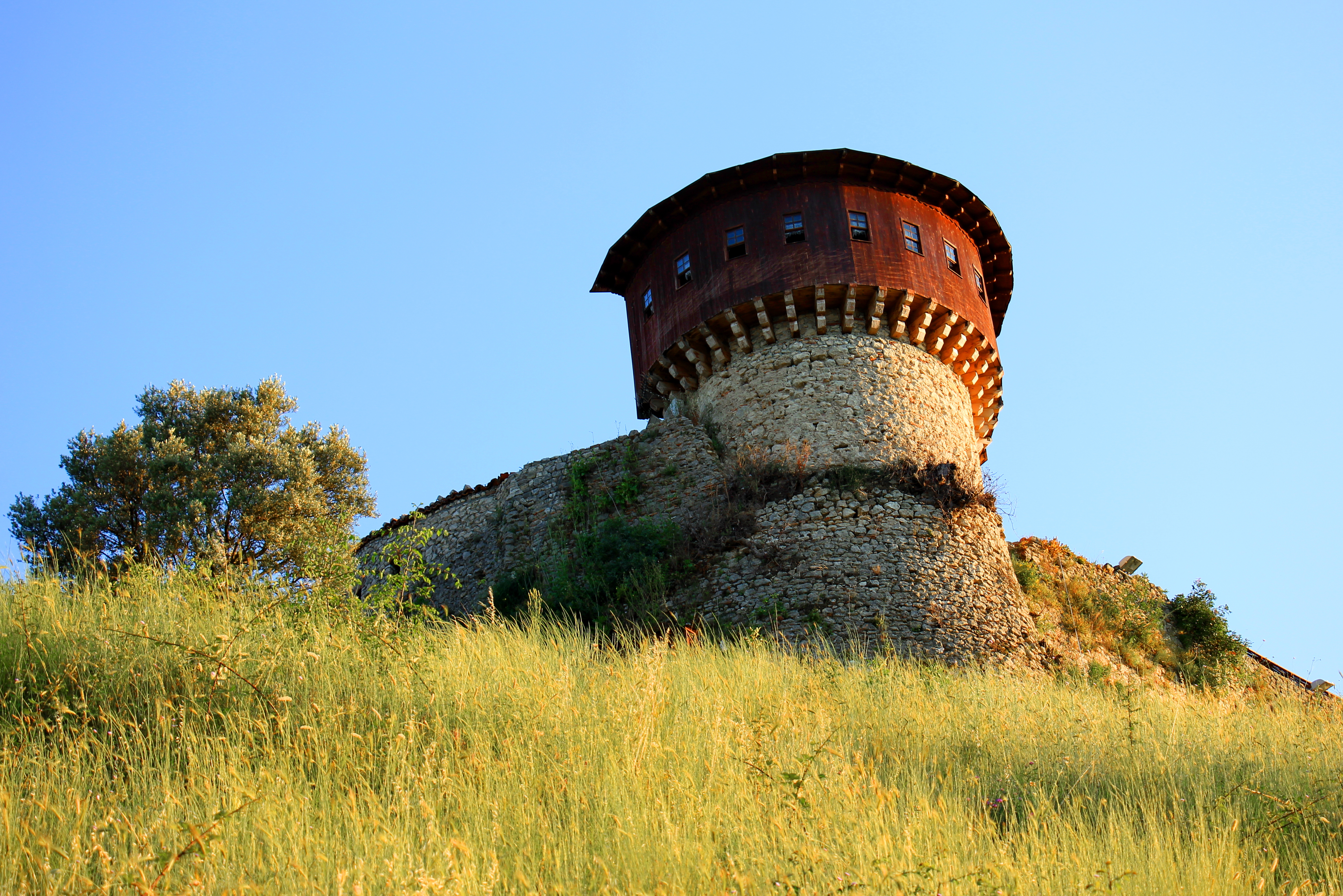 Kalaja e Petreles